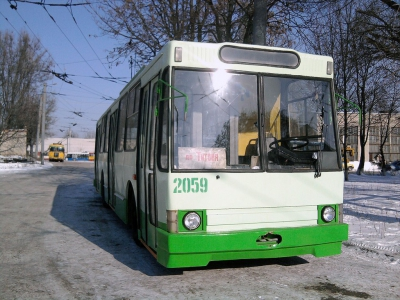 месяц после кр [врм]